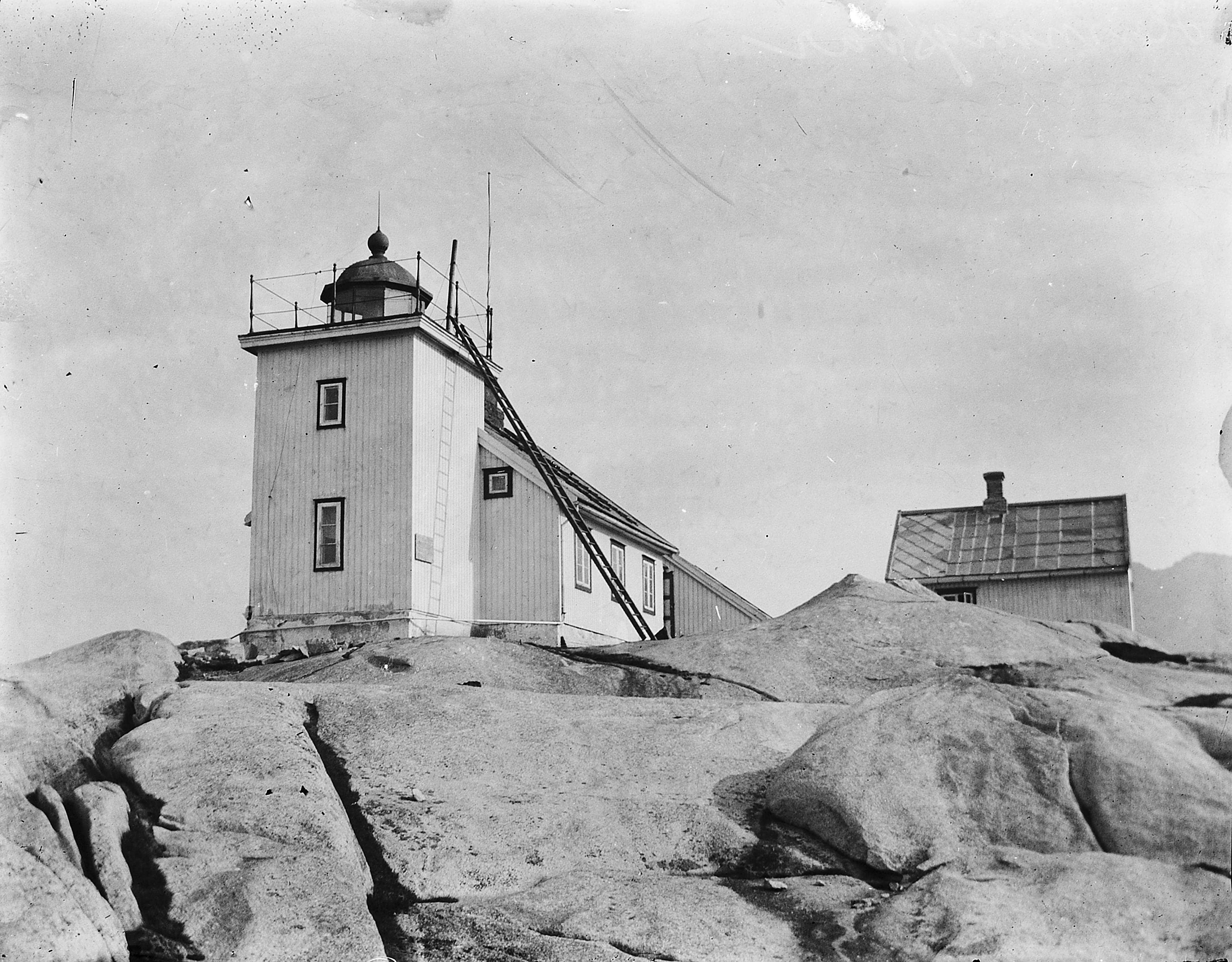 Bildet er hentet fra Arkivverket. Henningsvær, Vågan Arkivinstitusjon : Riksarkivet Arkivnavn : Fyrdirektoratet Sted : Norge, Nordland, Vågan, Heningsvær Emneord: Fyr, Kyst Avbildet